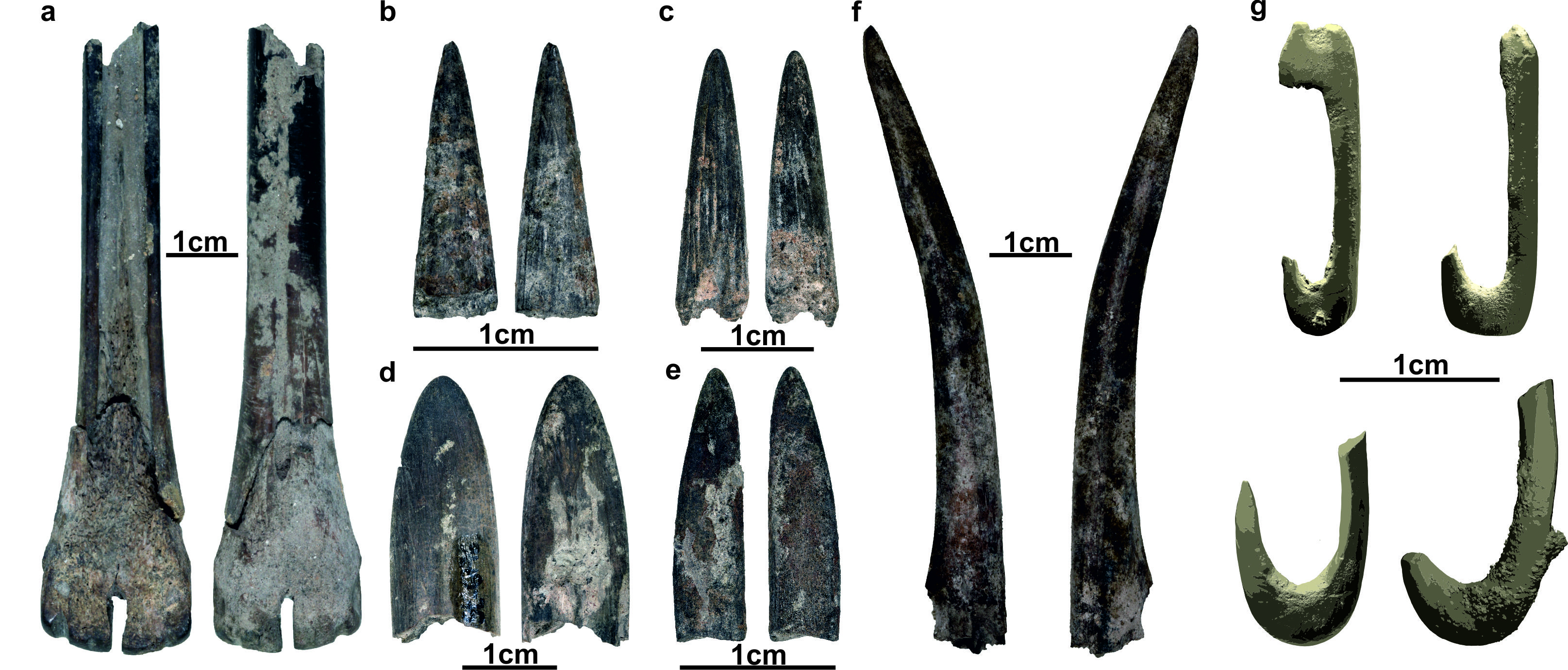 Lapa do Santo - Artefatos em osso Lapa do Santo